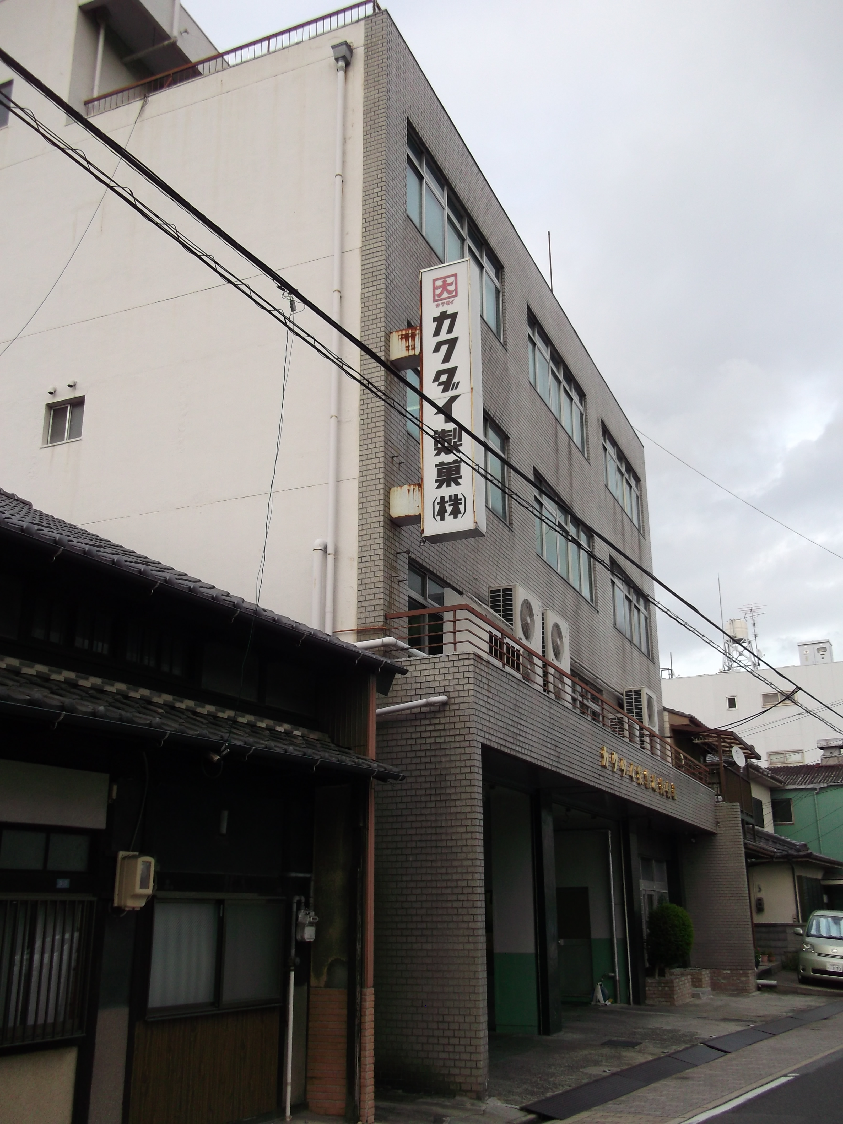 名古屋市西区のカクダイ製菓本社を南側公道東側より撮影